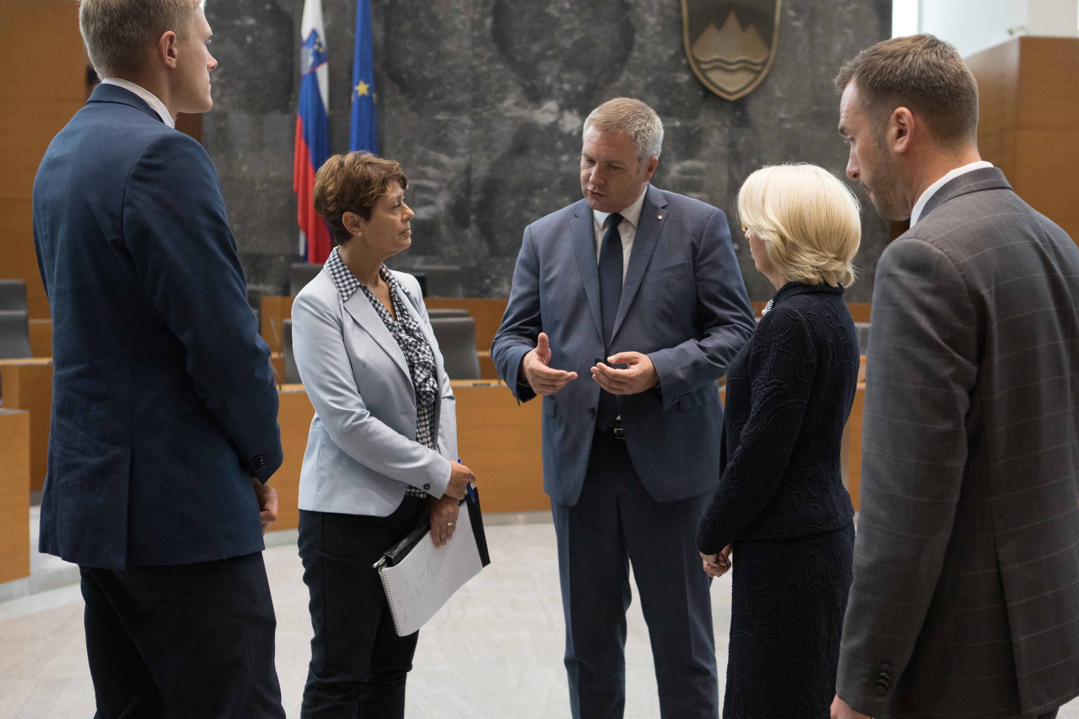 2019.gada 10.septembris. Ināra Mūrniece tiekas ar Slovēnijas Nacionālās asamblejas prezidentu Dejanu Židanu (Dejan Židan). Foto: Ernests Dinka, Saeima Izmantošanas noteikumi: saeima.lv/lv/autortiesības